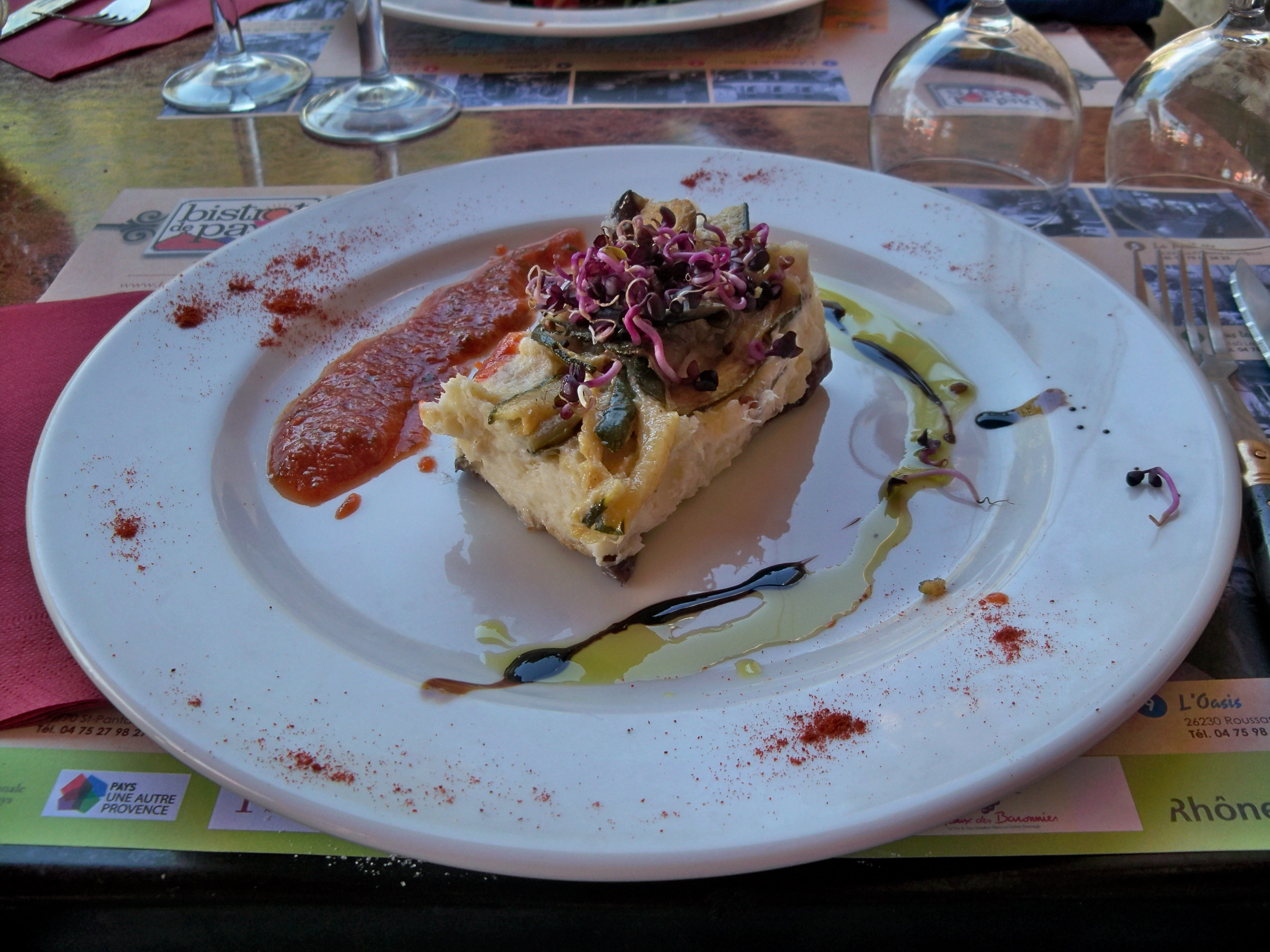 Lasagne de brandade, à base de brandade de morue et courgettes.